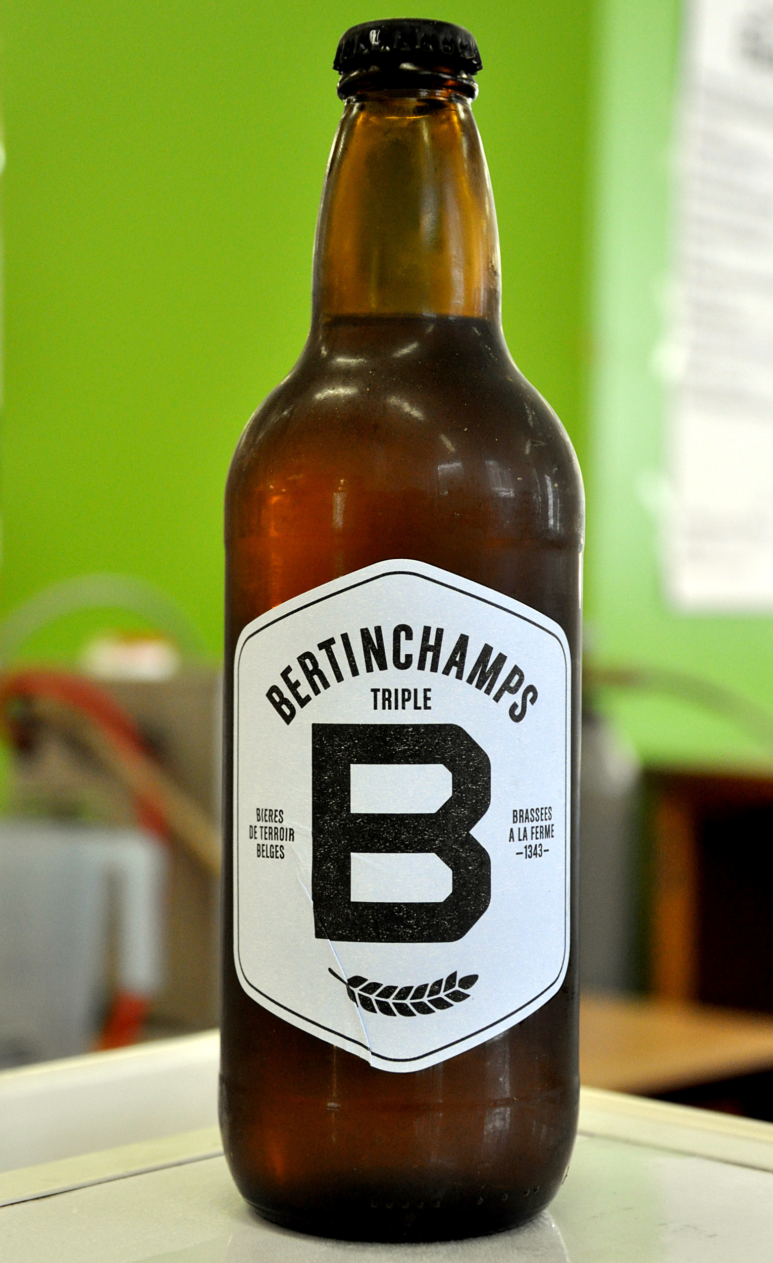 Bertinchamps Triple